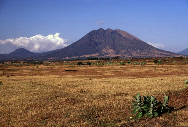 Usulután volcano rises above the Pacific coastal plain in El Salvador.